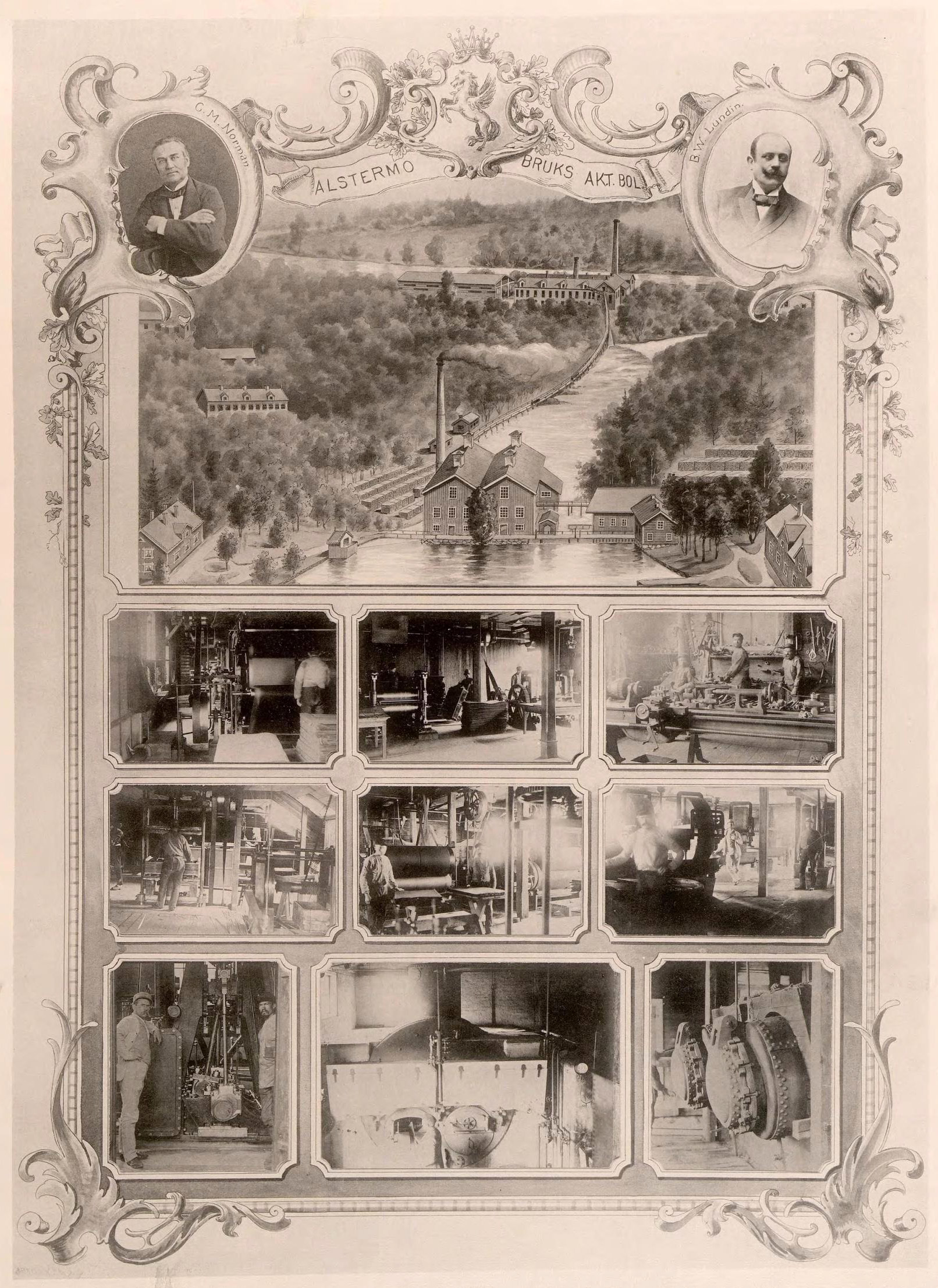 Alstermo Bruk